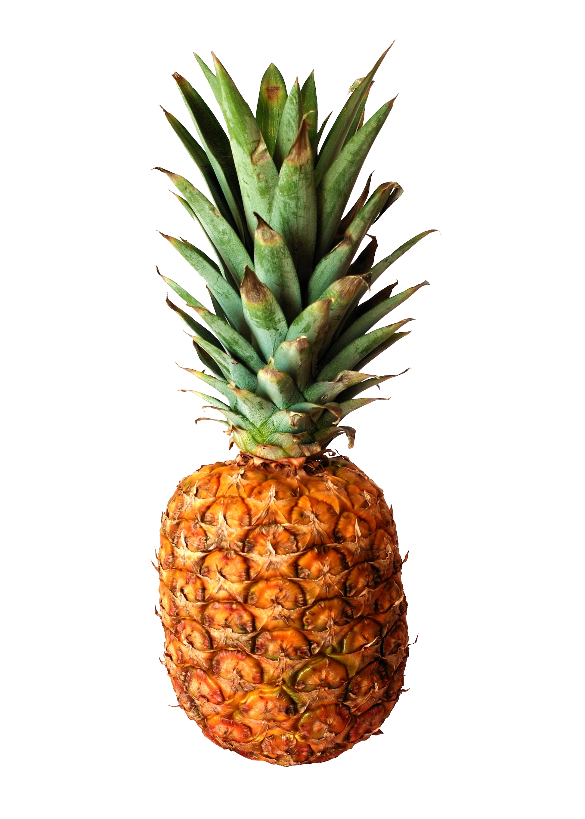 A ripe pineapple (Ananas comosus)